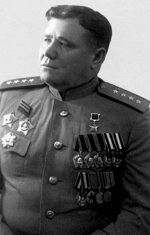 генерал армии Андрей Иванович Ерёменко